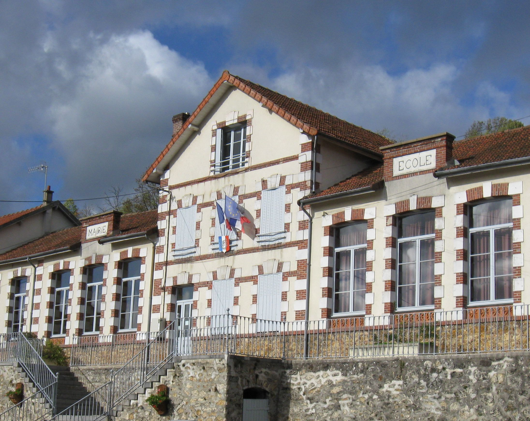 Mairie-école de Crouttes-sur-Marne. (département de l'Aisne , région Picardie).